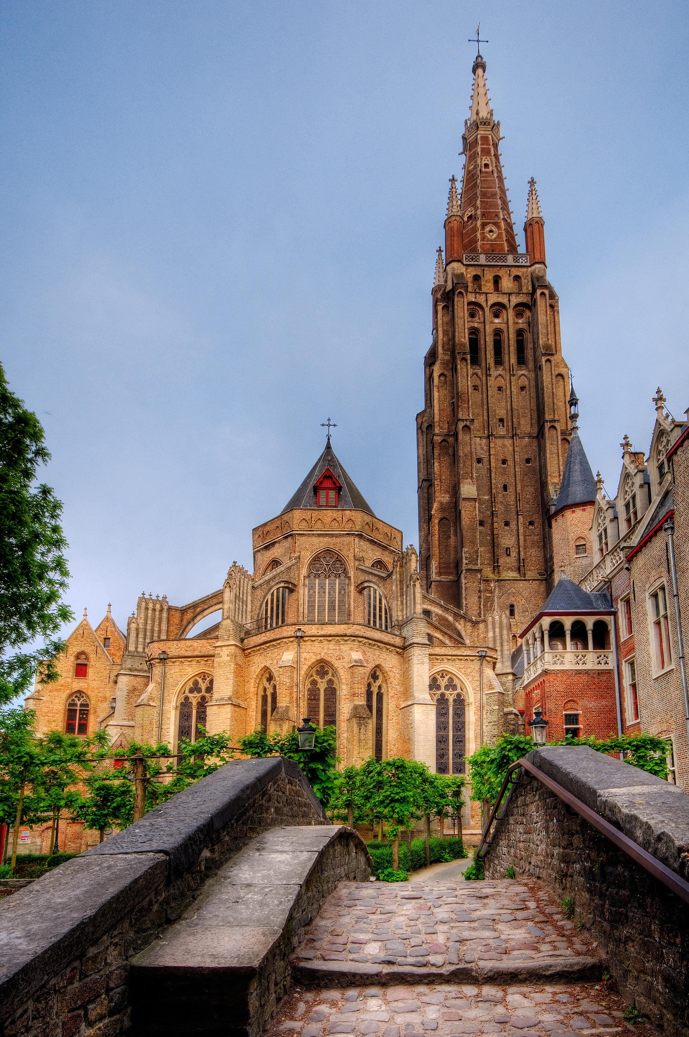 The Church of Our Lady in Bruges, Belgium. See Onze-Lieve-Vrouwekerk (Brugge).